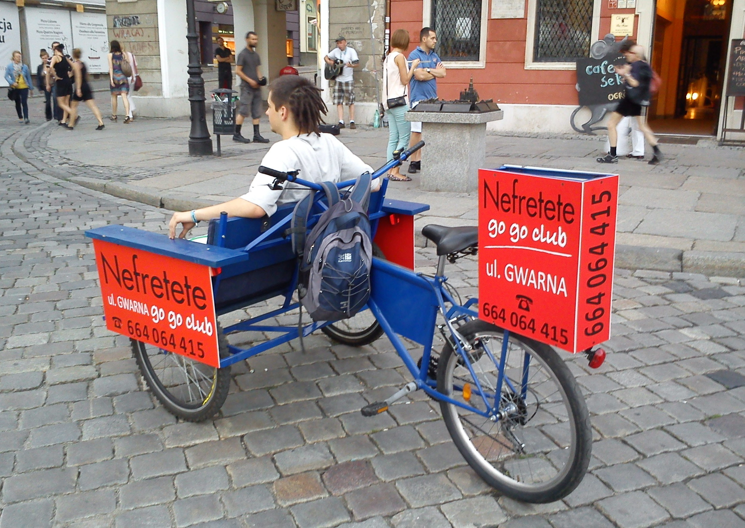 Rickshaw in the Old Market in Poznań.